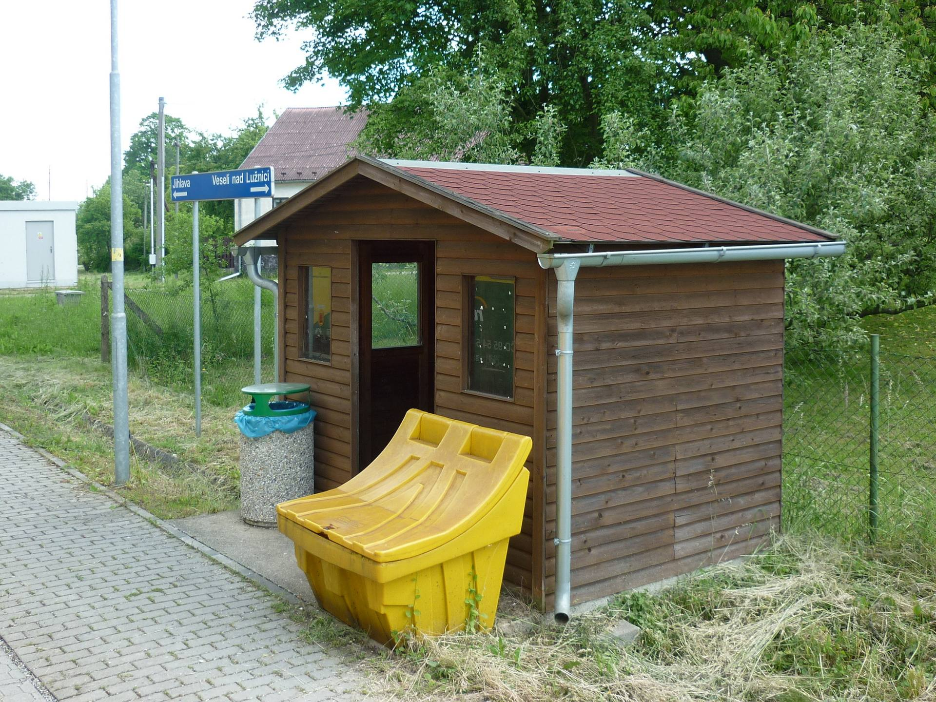 Železniční zastávka Bednárec na trati č. 225